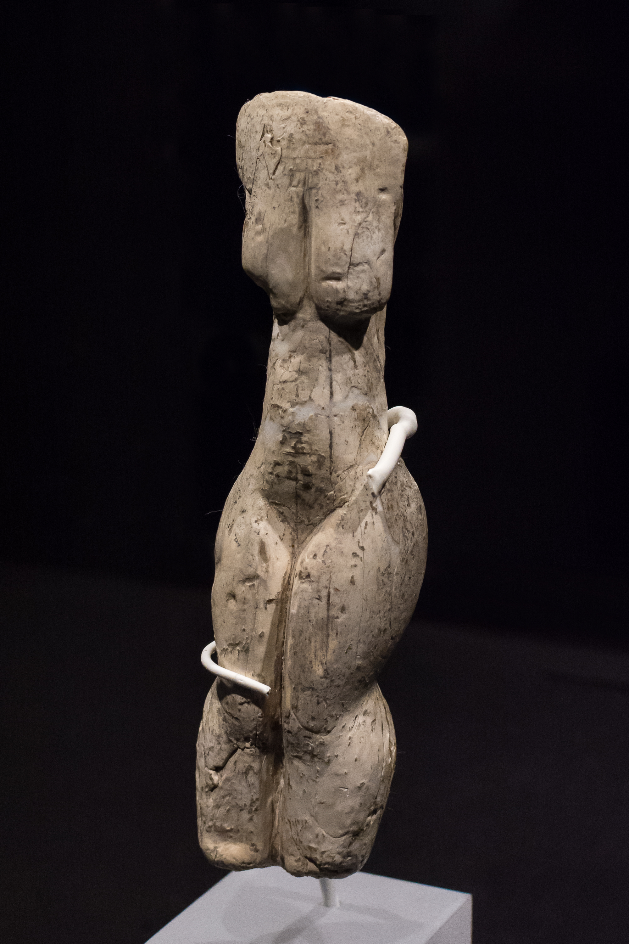 Frauenstatuette von Eliseevichi, Mammutelfenbein, Höhe: 150 mm, Epigravettien ca. 15.000 BP, Original, ausgestellt im Archäologischen Museum Hamburg (Eiszeiten - Die Kunst der Mammutjäger vom 18. Oktober 2016 bis 14. Mai 2017). Aufbewahrungsort sonst Kunstkammer Sankt Petersburg, Russland.